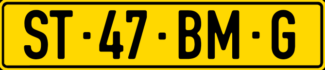 Номерний знак Кабо-Верде